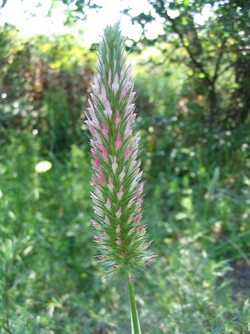 Trifolium angustifolium (trèfle à feuilles étroites) Photo prise à Ille-sur-Têt (66) en mai 2004 Jean Tosti 11/2004